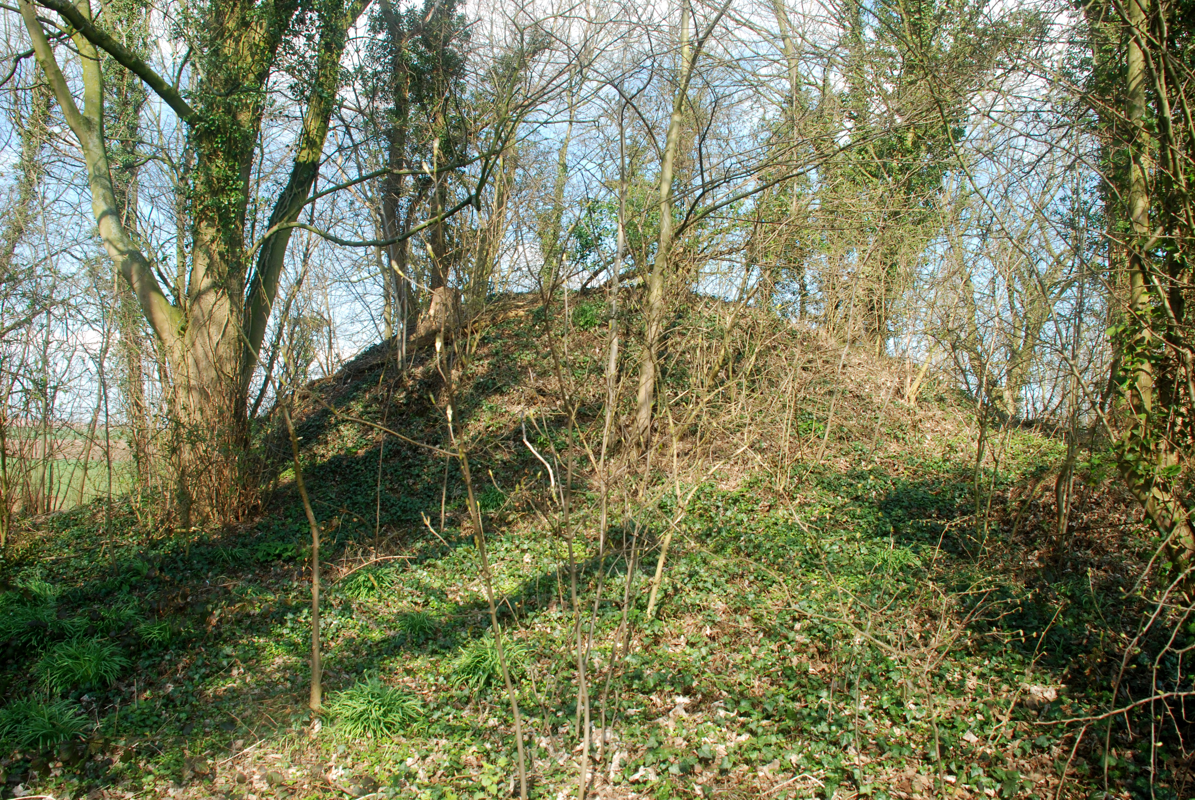 Belgique - Walhain - Tourinnes-Saint-Lambert - Tumuli de Libersart